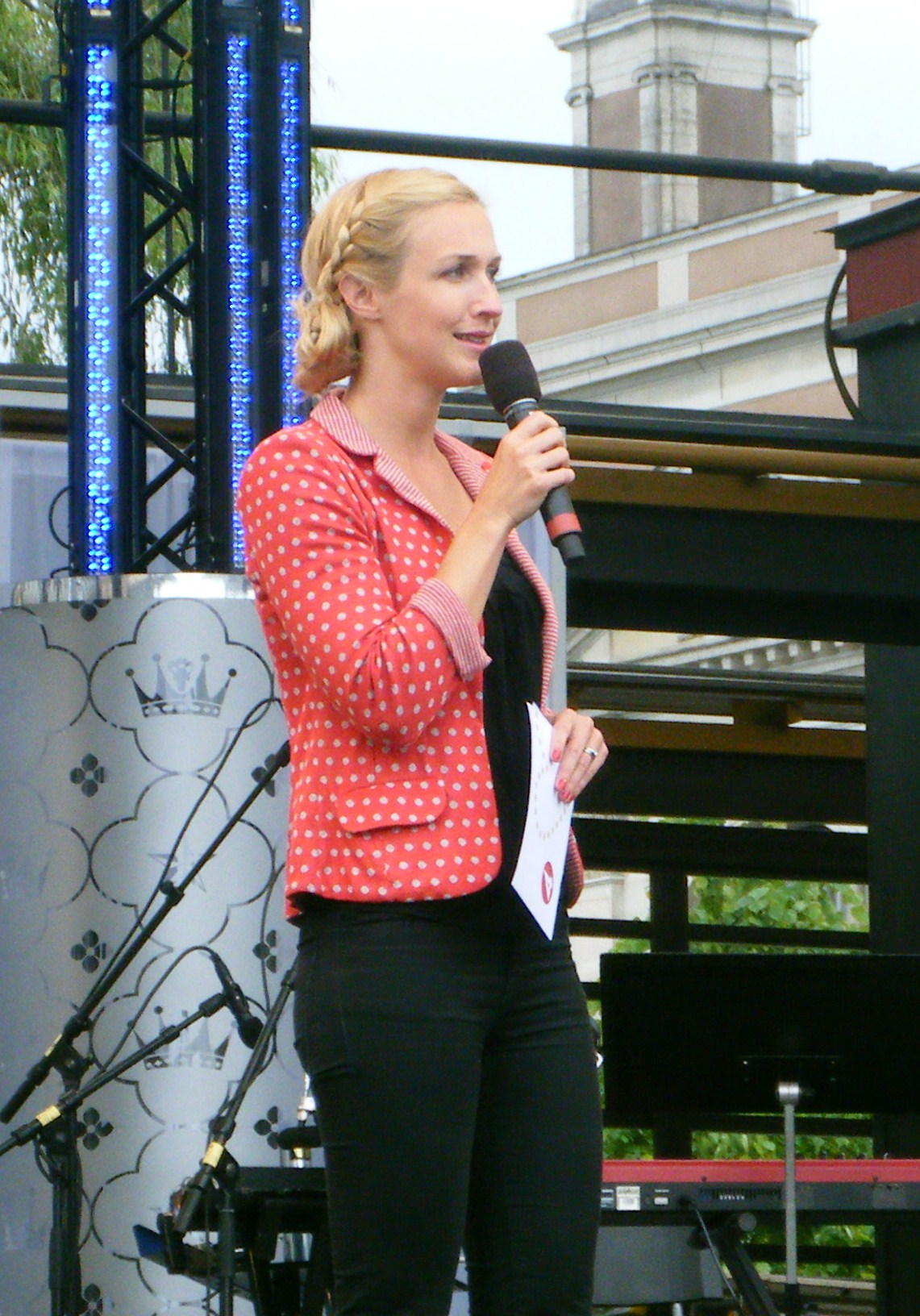 TV-host Caroline Norrby in Kungsträdgården